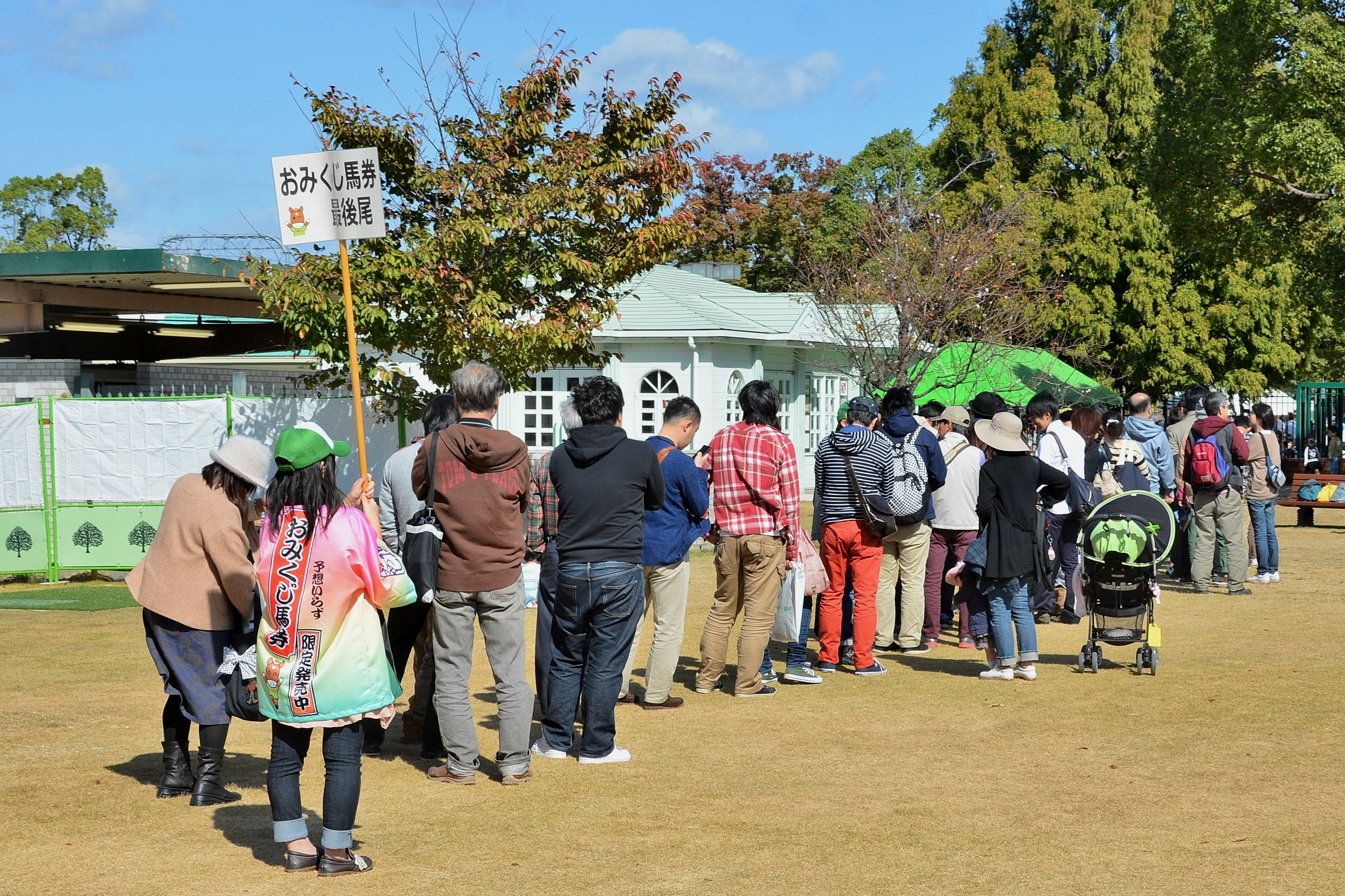 2015年10月25日に京都競馬場で、限定販売された「おみくじ馬券」を求める行列風景を、陽だまり広場で撮影したもの。 Nikon D7100 + AF-S DX Nikkor 18-200mm f/3.5-5.6G ED VR II